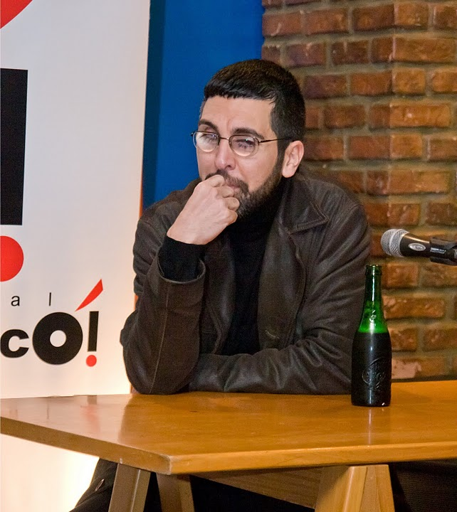 Fotografía de Sergi Durà en una de las presentaciones de su libro "Un Home Llop Xangainés a Dubai"